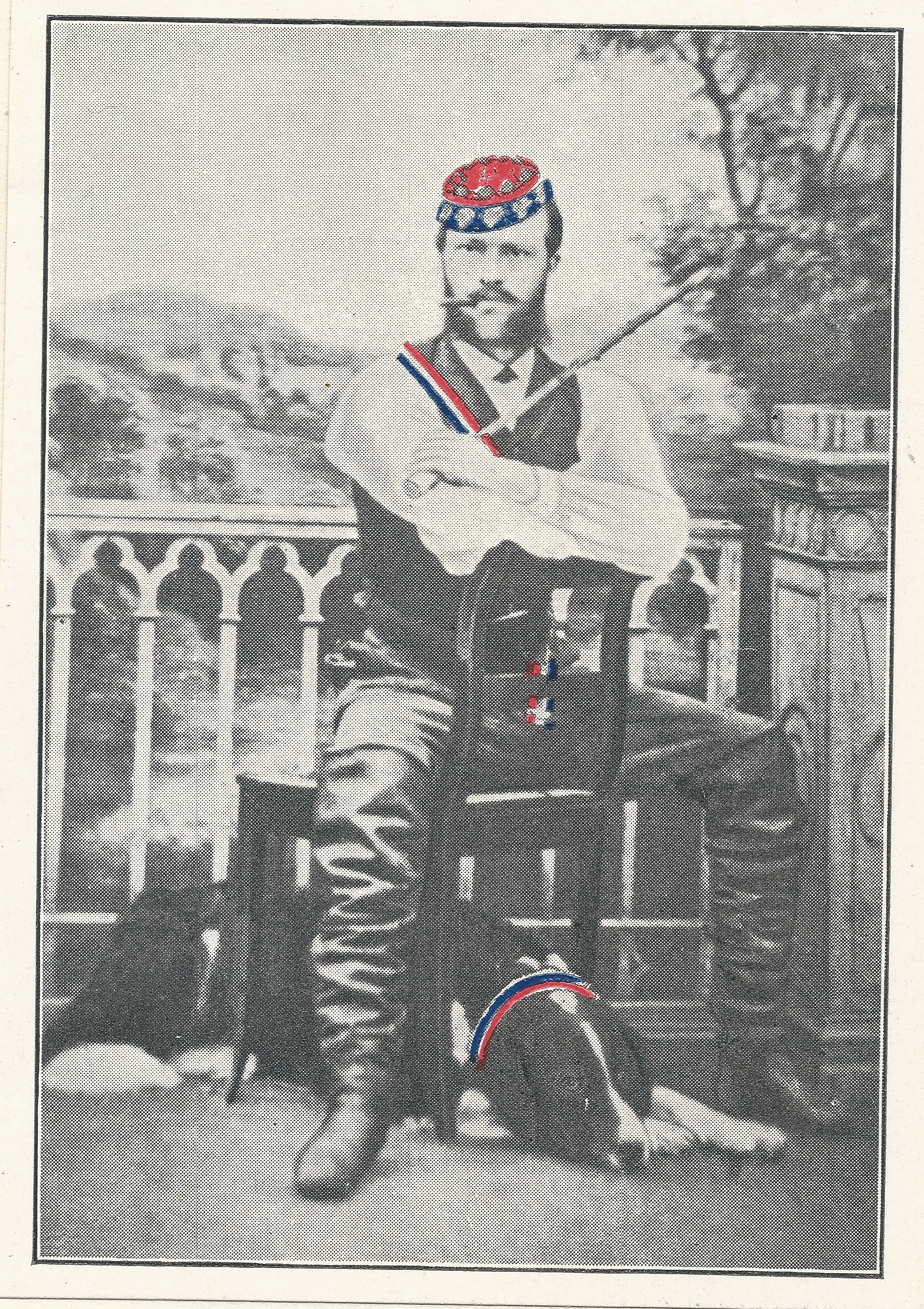 Max Kauffmann als Hallenser Teutone